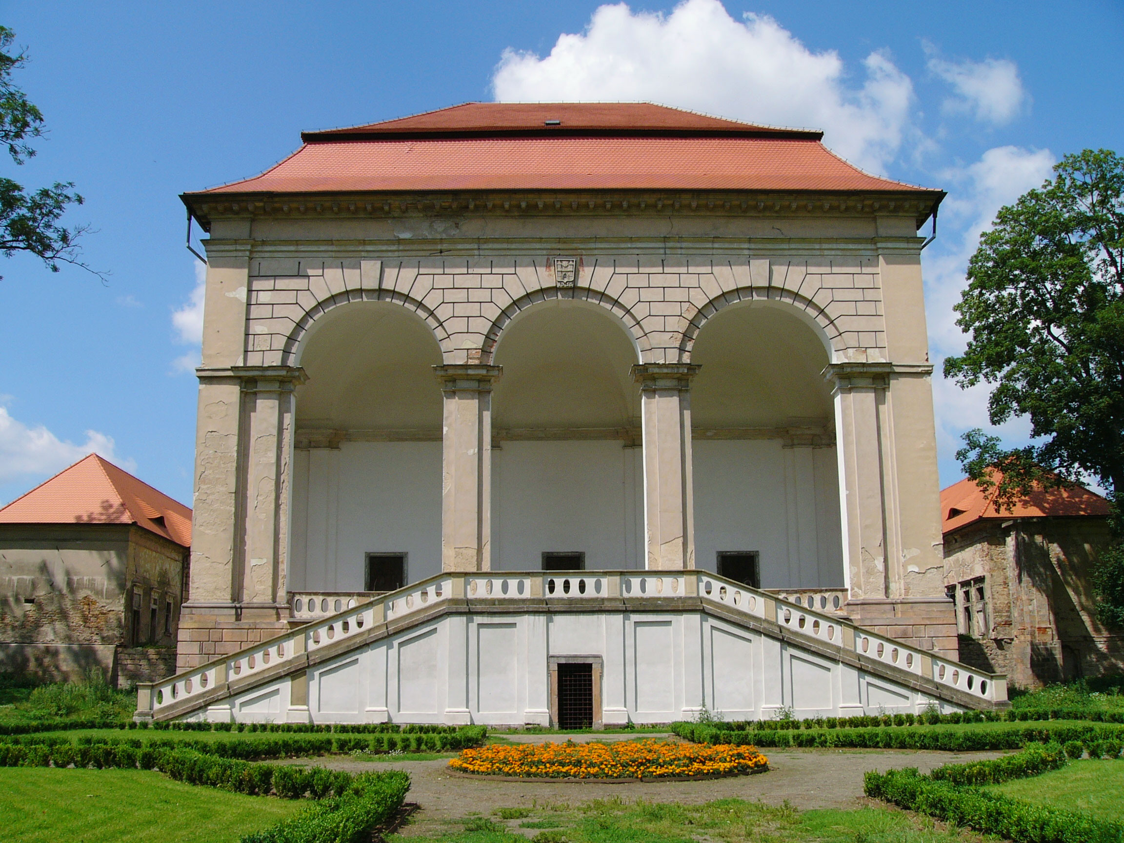 Valdštejnské lodžie v Libosadu